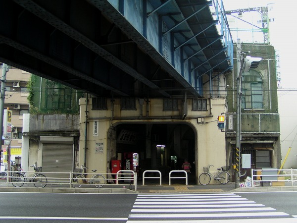 2005年11月6日に投稿者が撮影 国道駅